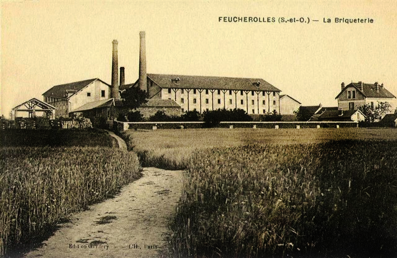 La briqueterie de Feucherolles au début du siècle. En arrière plan, on peut apercevoir les 3 cheminées des fours de cuisson des briques.